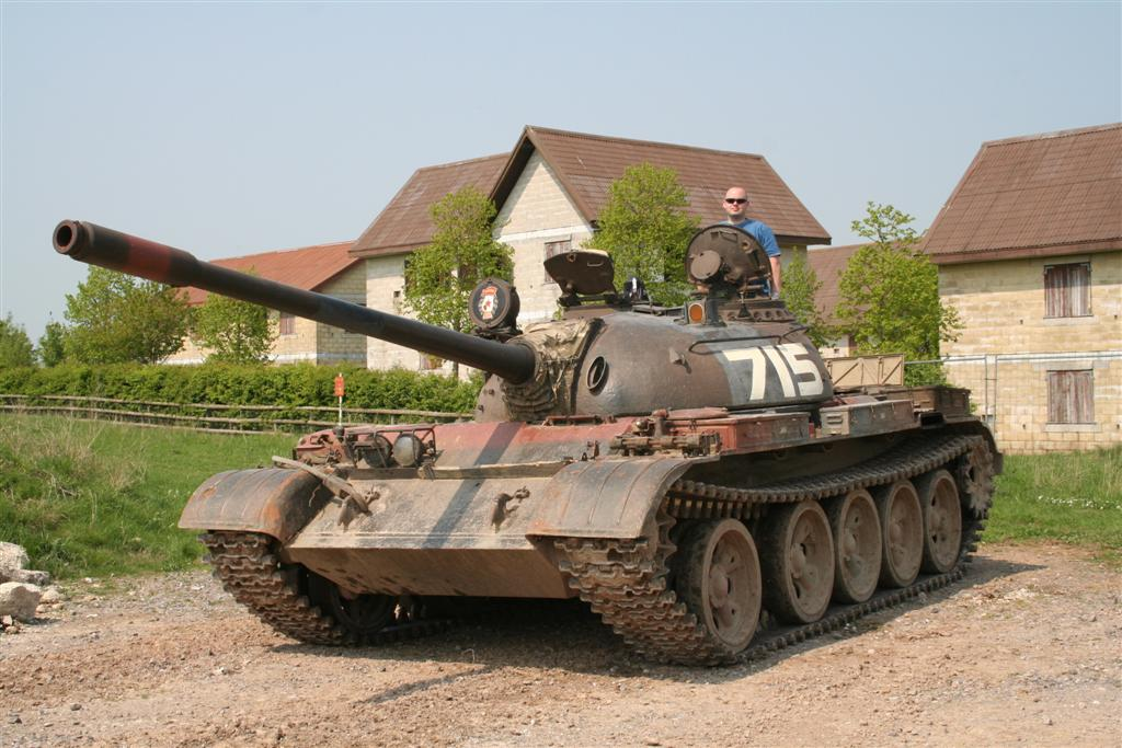 T-55 main battle tank.